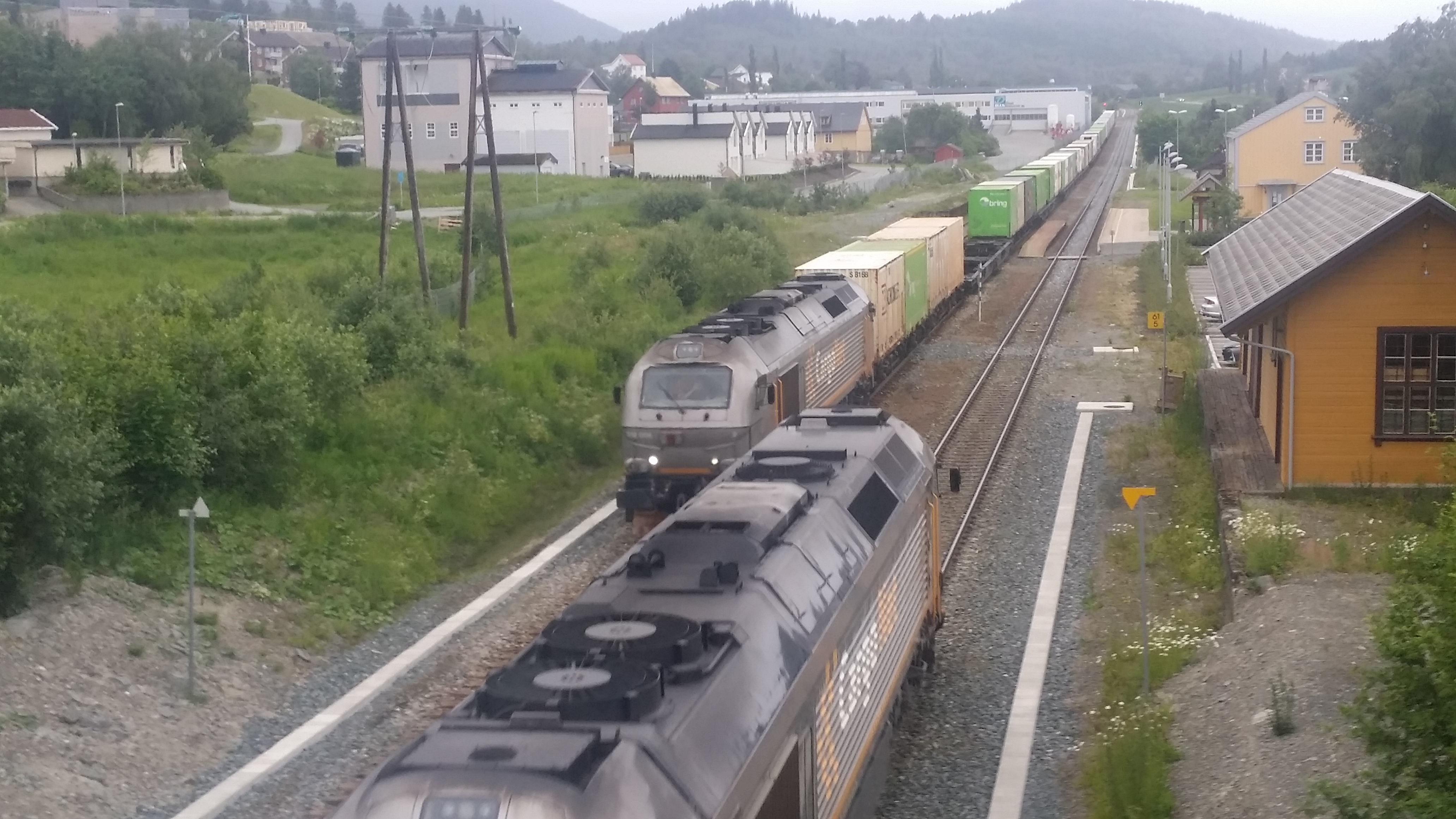 To godstog møtes på Åsen stasjon.